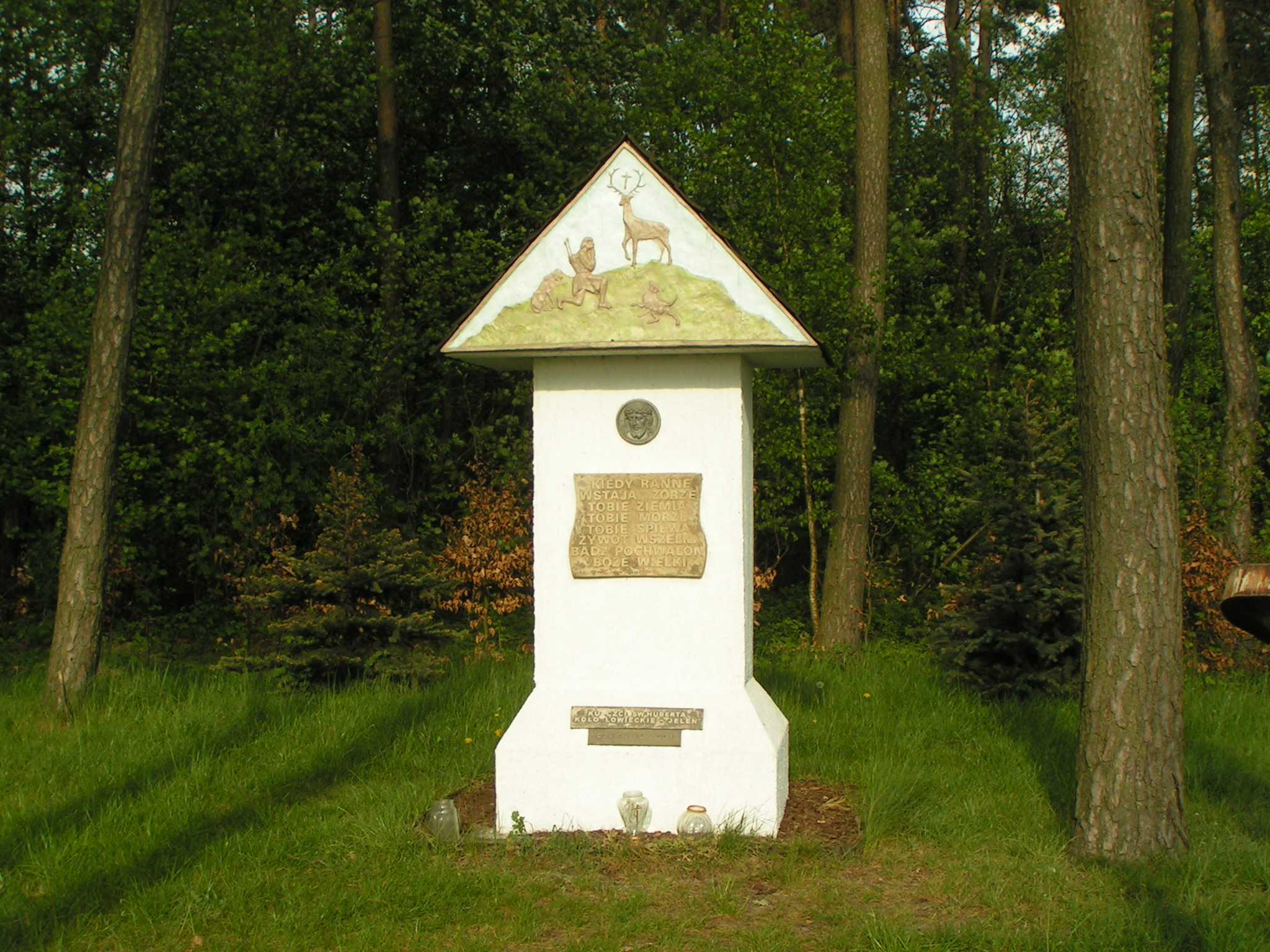 Kapliczka na skraju lasu w Czołowie-Kolonia.